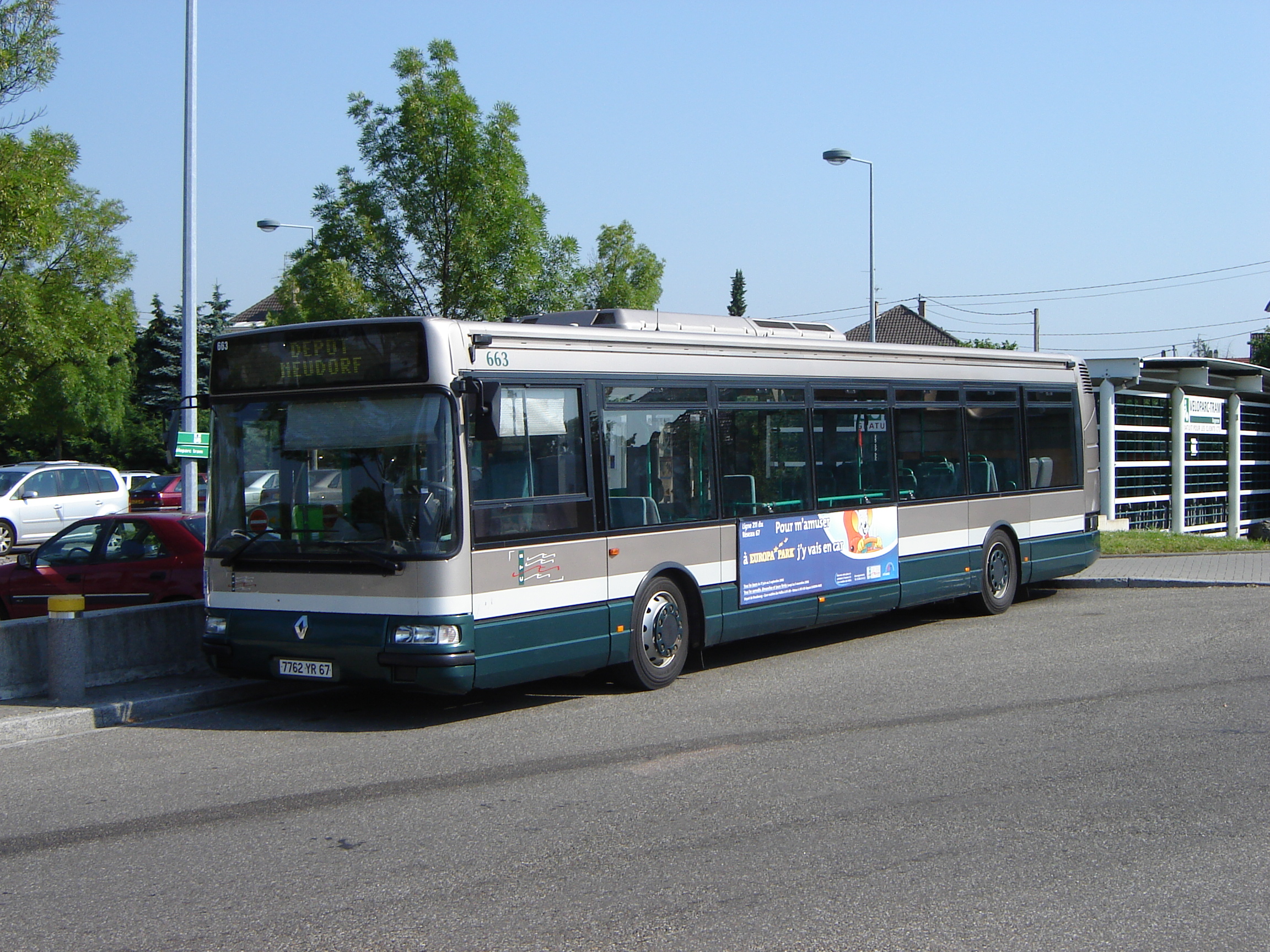 Un Renault Agora S à Baggersee, Strasbourg